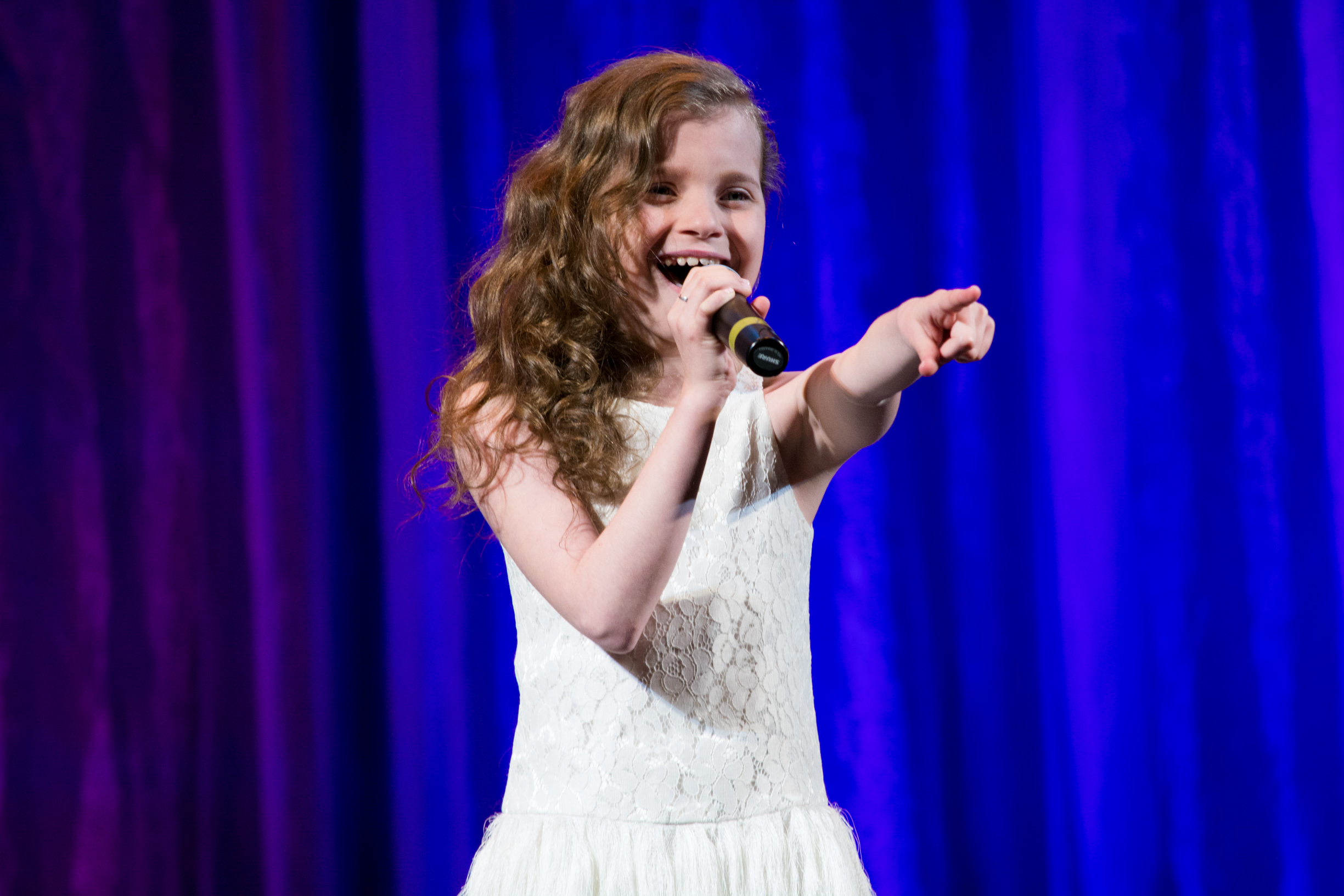 Алиска Кожикина на концерте «Детские голоса» команды Максима Фадеева. Санкт-Петербург, 01.06.2015